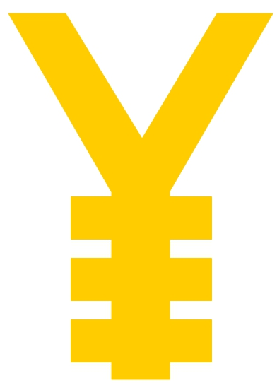 Divisionsabzeichen der 18. Panzer-Division der Wehrmacht